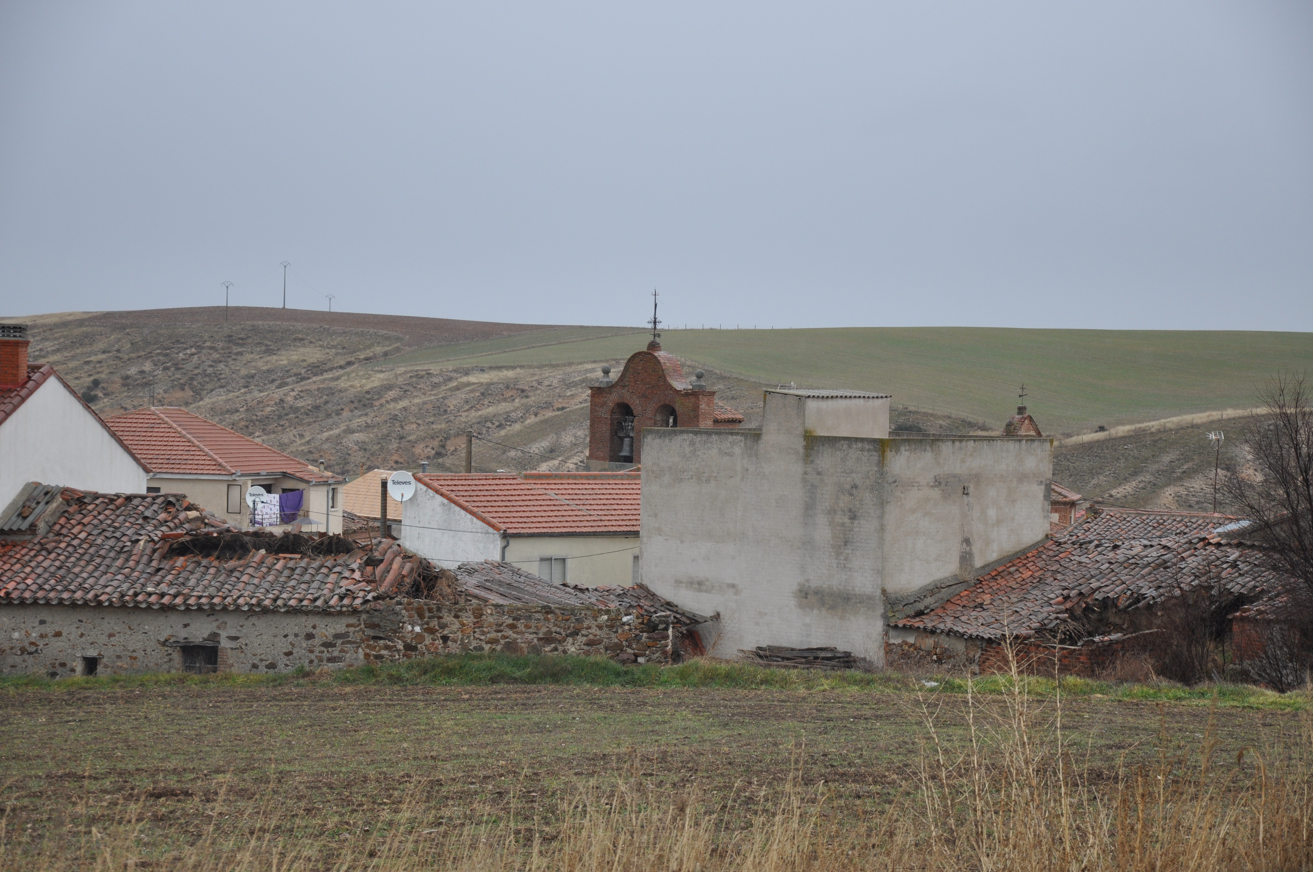 Panorama de Vita, Ávila, España